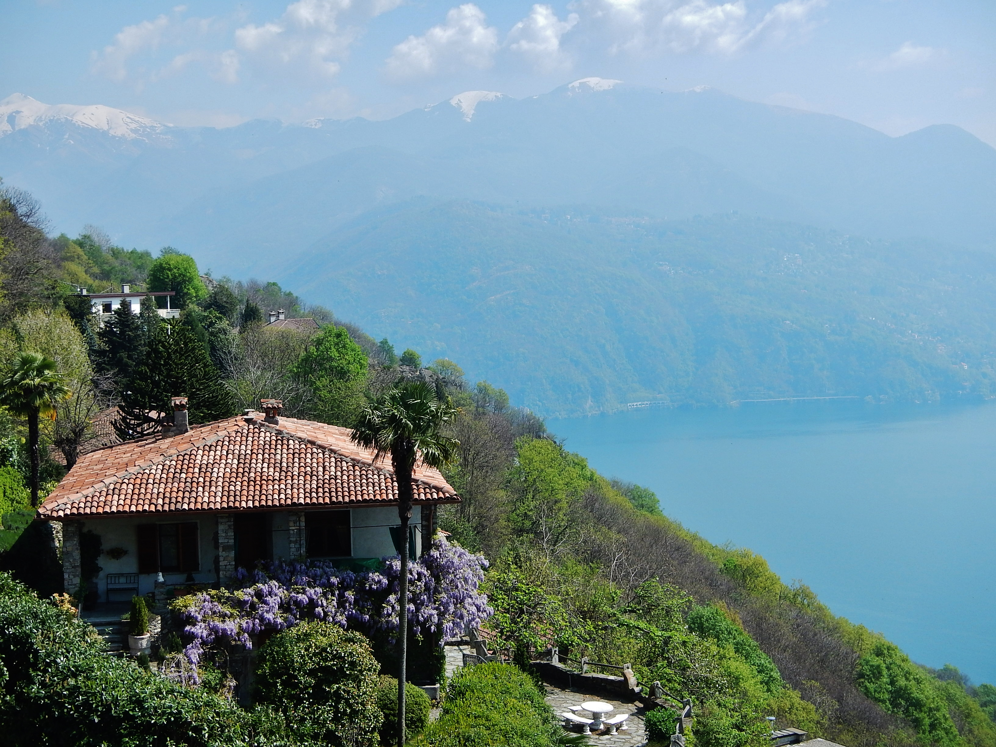 Houses at Viggiona Verbano-Cusio-Ossola